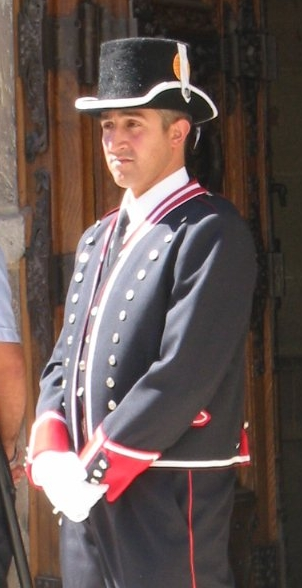 Mosso d'Esquadra uniforme de gala.